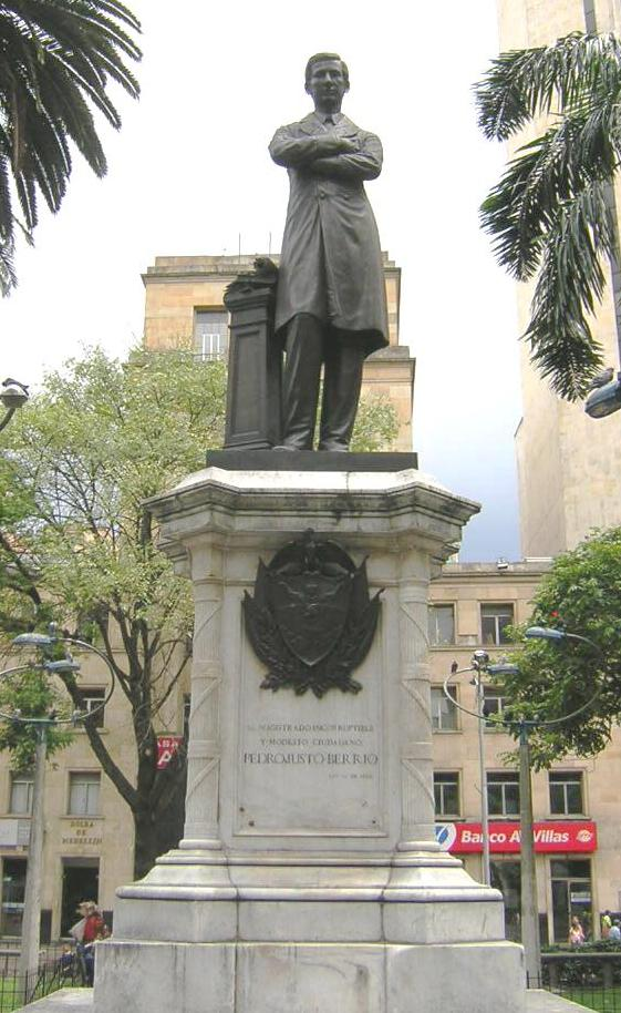 Estatua de Pedro Justo Berrio, ubicado en Parque Berrio, Medellín, Colombia